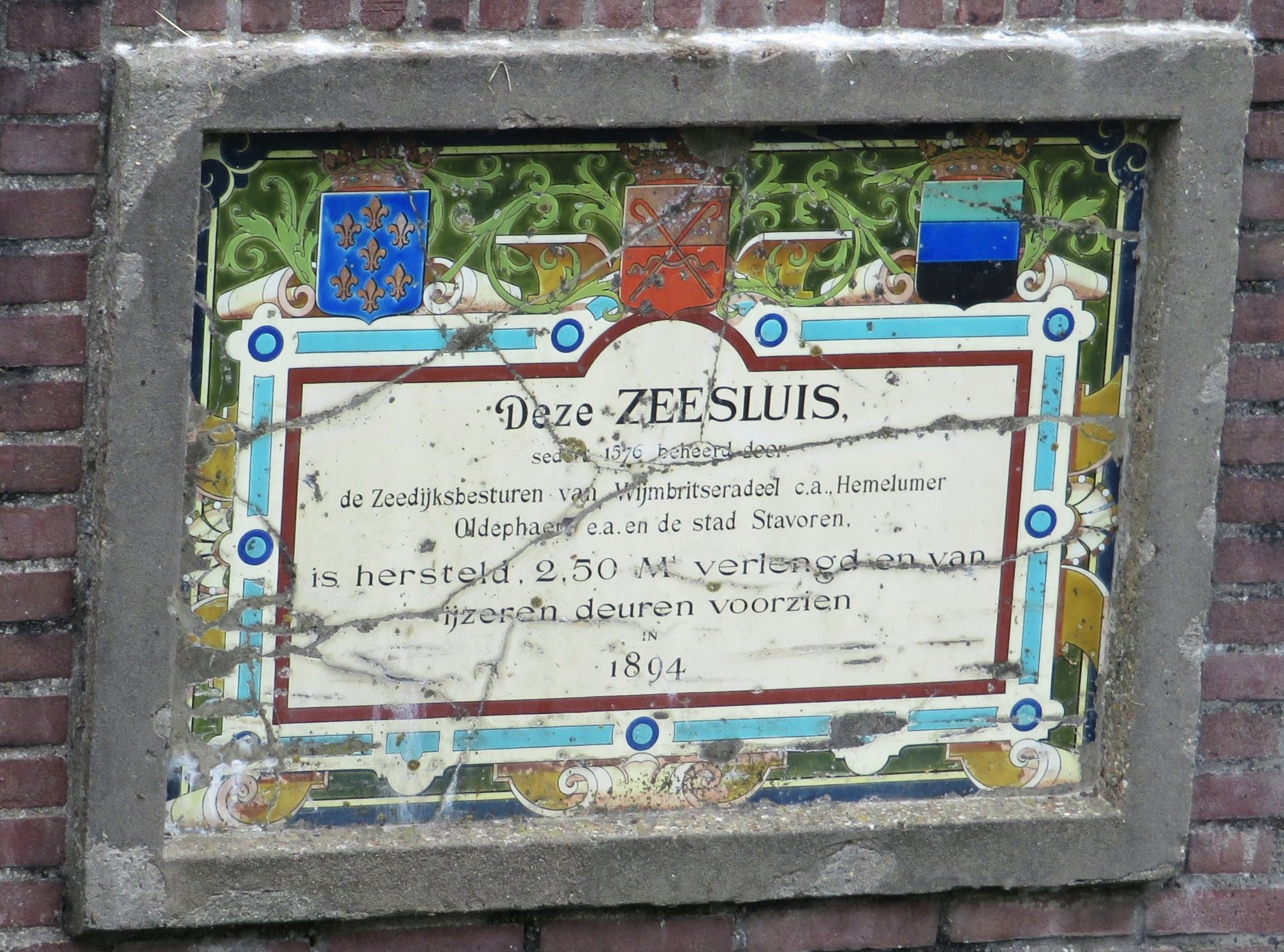 Muursteen in de oude zeesluis van Stavoren